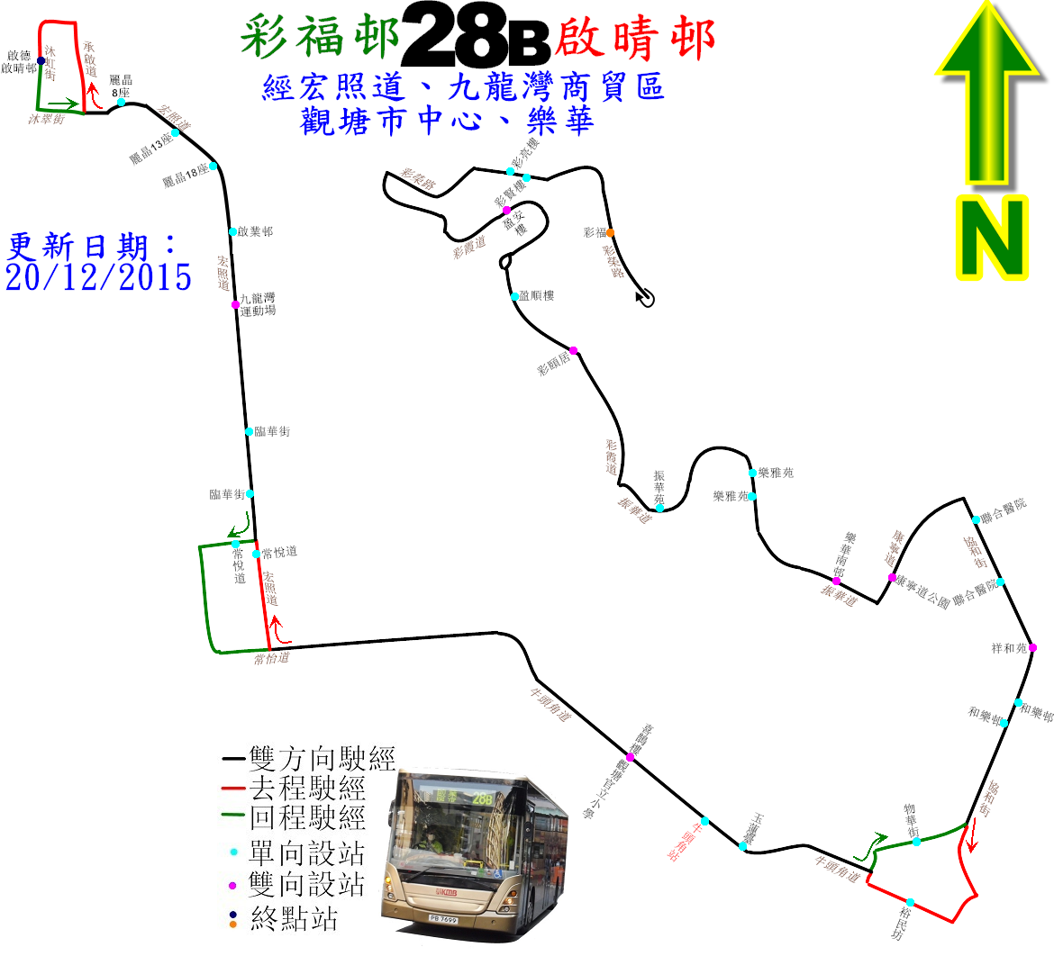 中文（香港）: 九巴28B線的走線圖